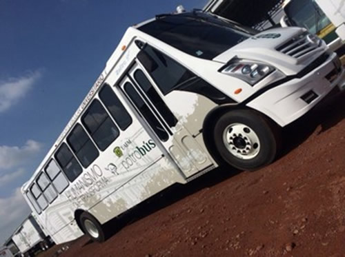 Potrobús